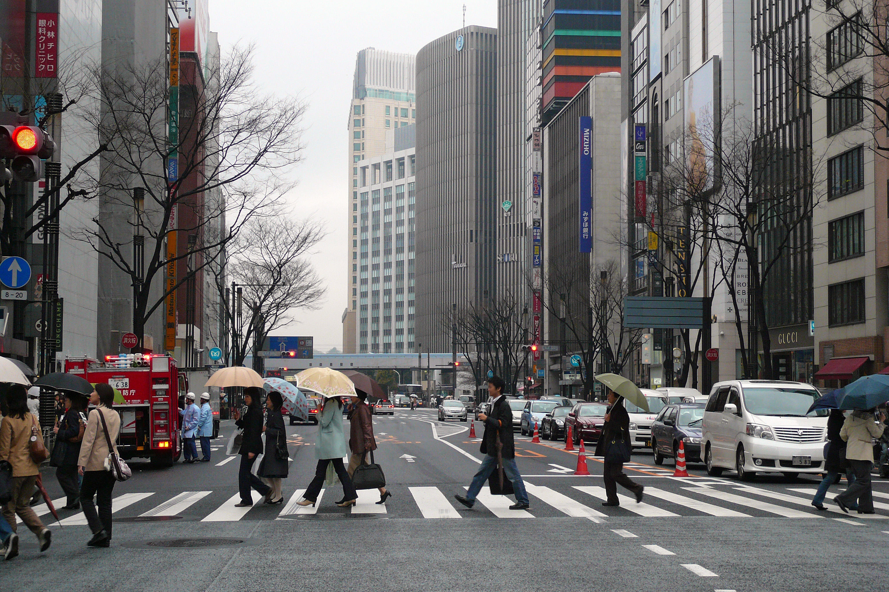 Mitsui Main Building in Chuo-ku, Tokyo, Japan